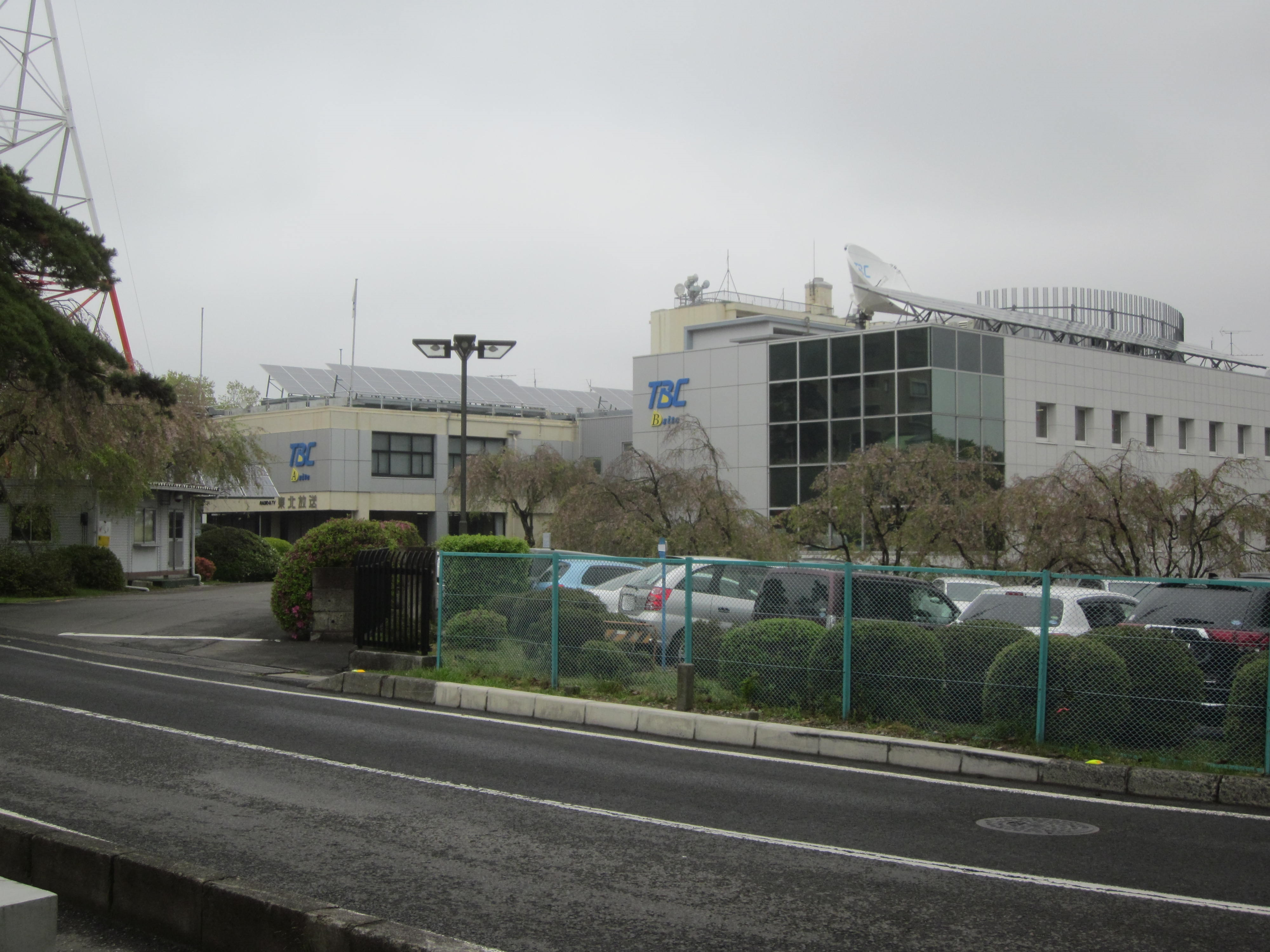 2016年5月2日、投稿者自身による撮影。左が「A-site」、右が「B-site」